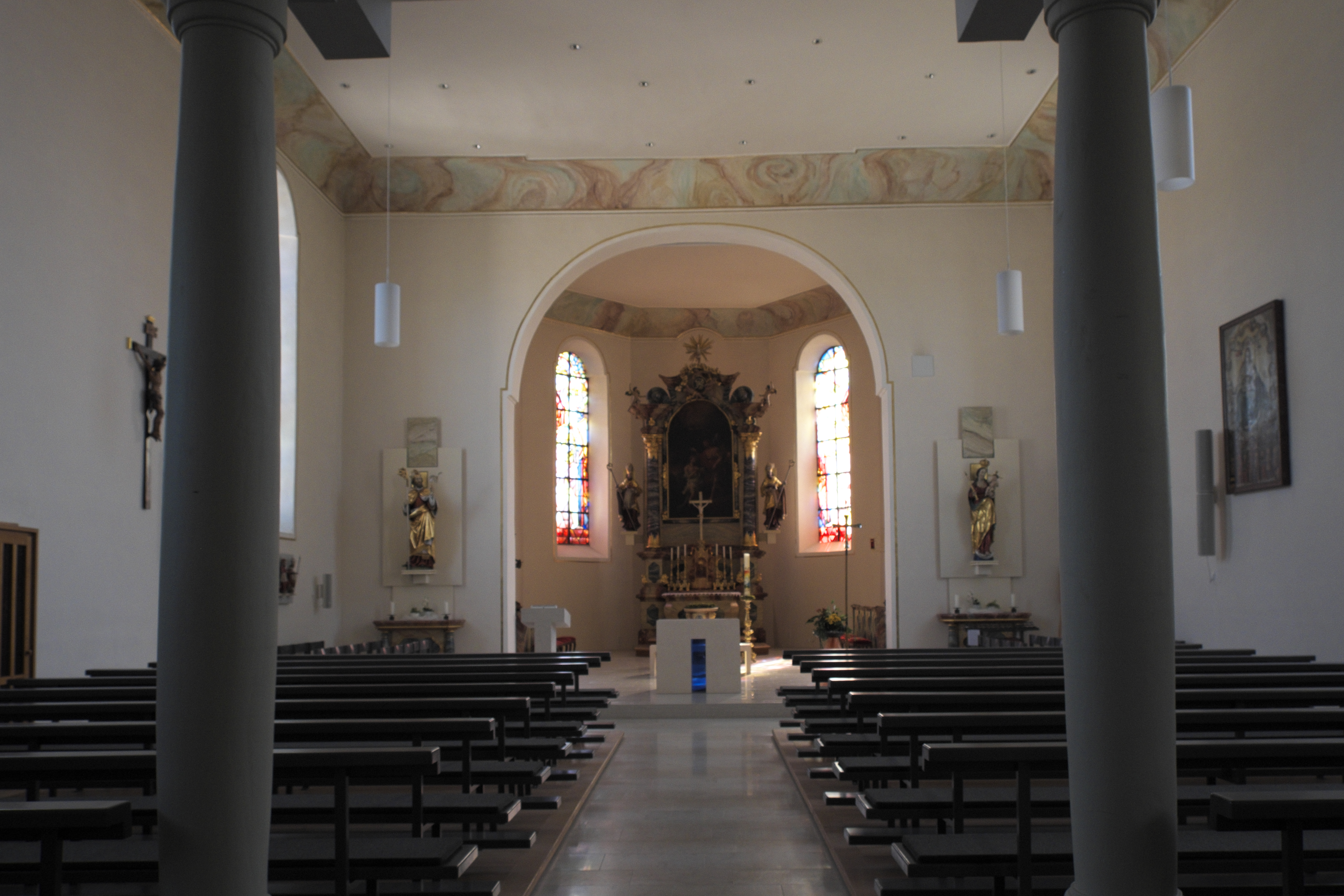 Katholische Pfarrkirche St. Nikolaus in Aach (Hegau) im Landkreis Konstanz (Baden-Württemberg/Deutschland), Innenraum